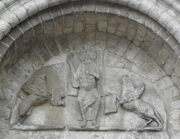 Tympan roman du transept nord de la cathédrale Notre-Dame-de-l'Assomption de Luçon (35).